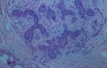 Histologischer Querschnitt des Juxtaoralen Organs, W. Zenker